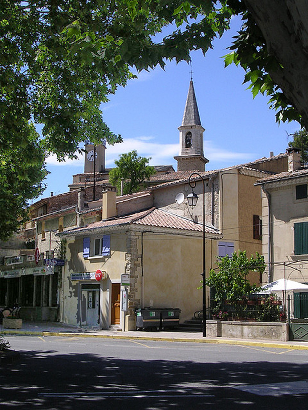 Centre du village de Loriol-du-Comtat